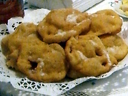 A portuguese desert called 'filhós' (bolinho feito de farinha e ovos, frito e polvilhado com açúcar e canela)